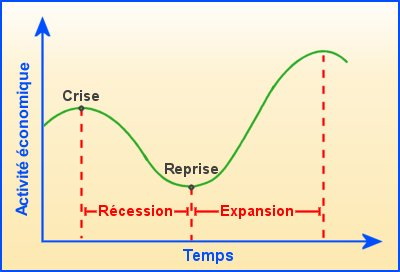 Cycles économiques de Kondratieff (ou Kondratiev). Il est lui même composé de cycle de Juglar, plus court (environ 8 ans et demi) eux-mêmes composés de cycle de Kitchin qui sont eux encore plus brefs (environ 40 mois).